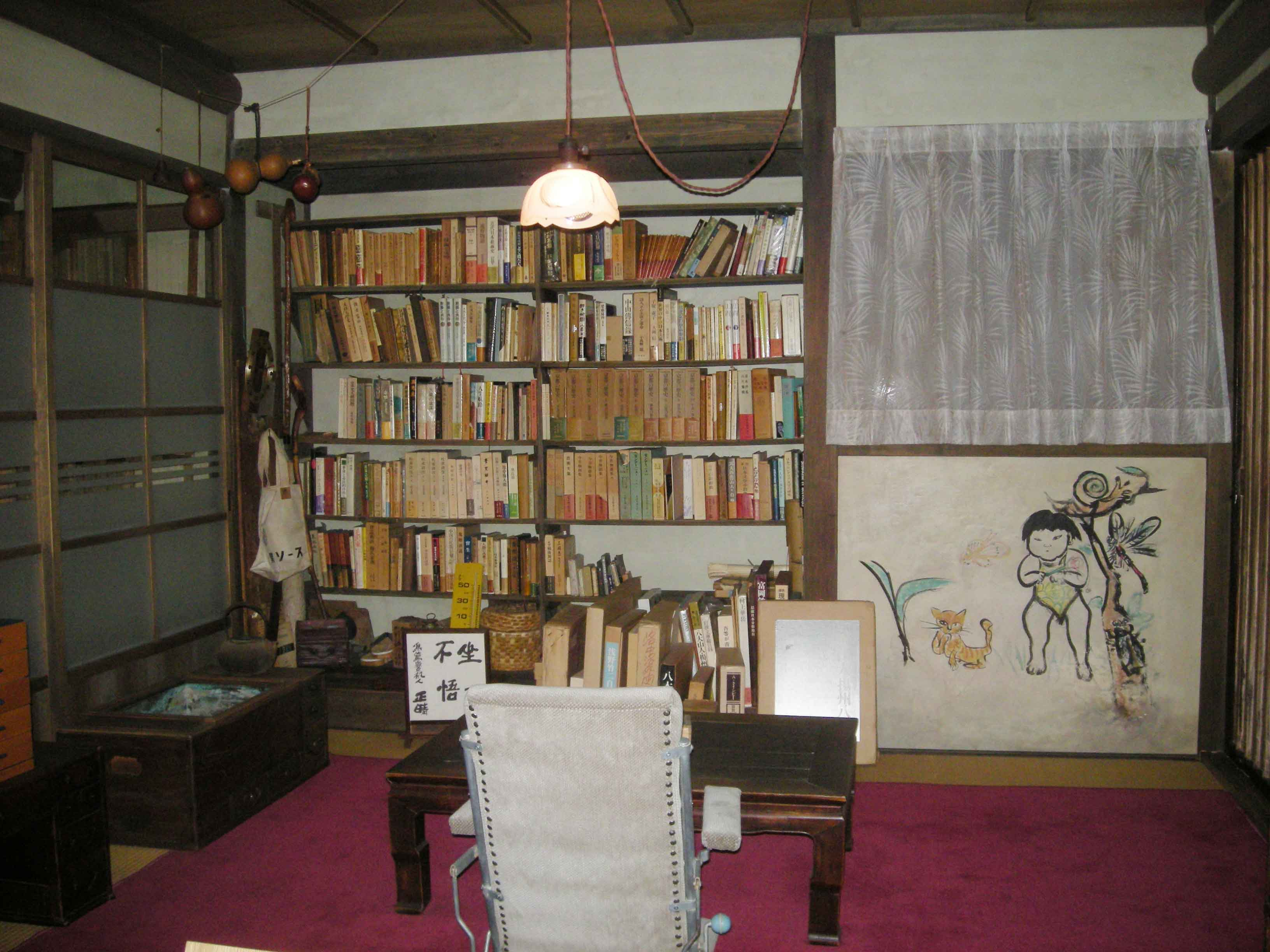 茨木市立富士正晴記念館